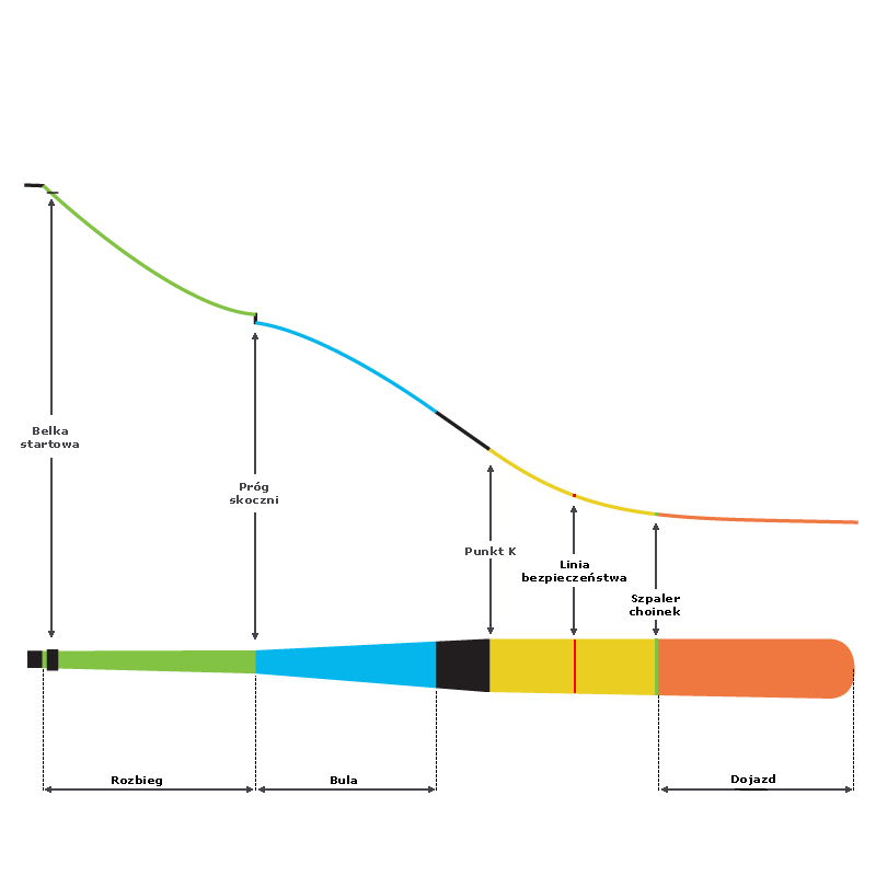 Skocznia narciarska. Schematyczny przekrój